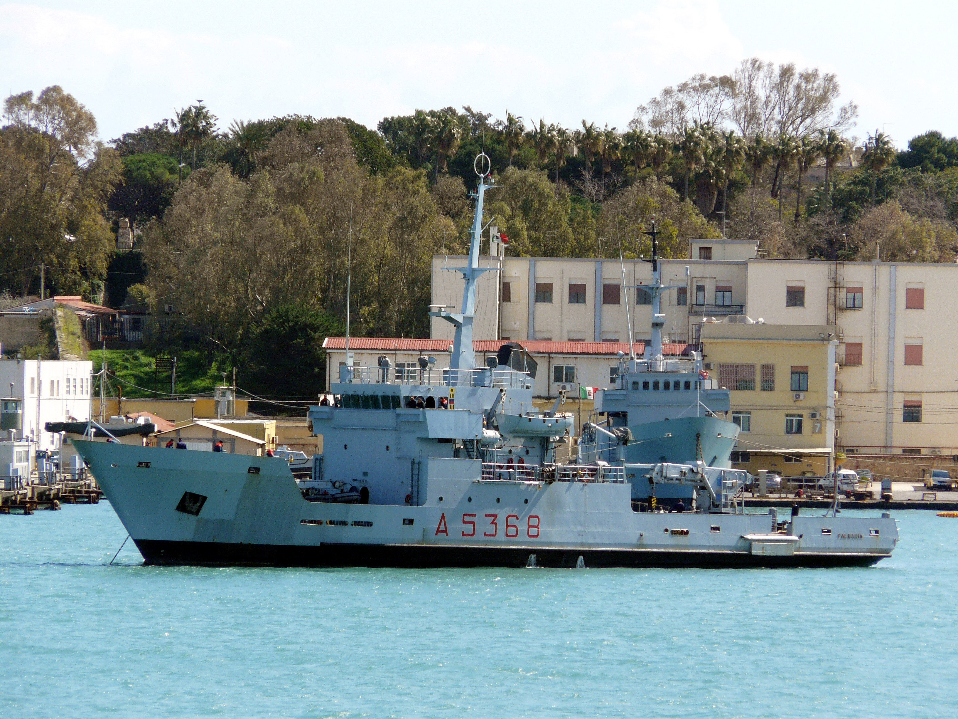 Nave trasporto fari Palmaria